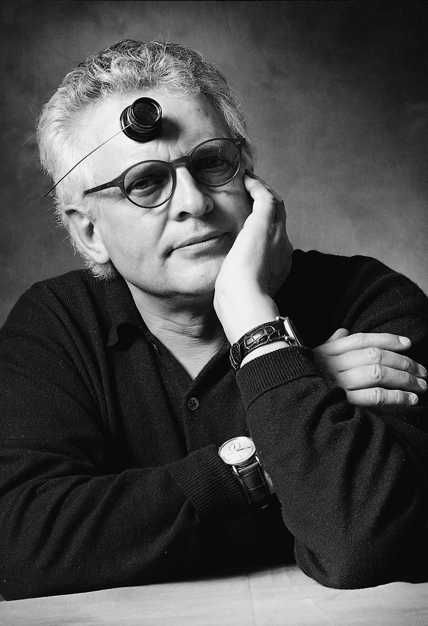 Gerd R. Lang, Uhrmachermeister und Gründer CHRONOSWISS München/Deutschland